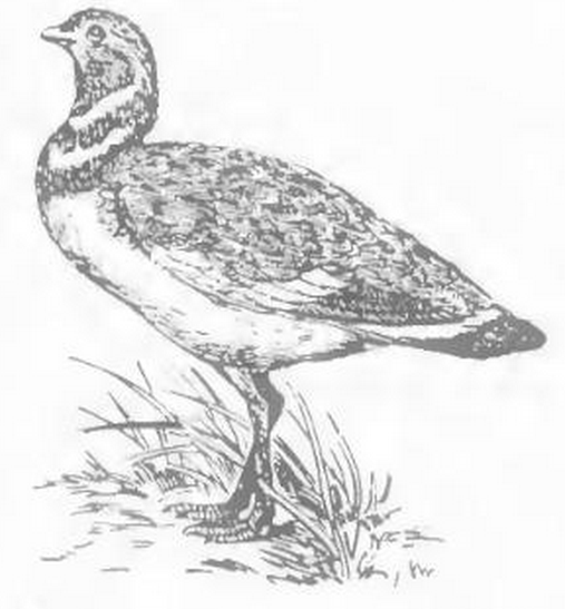 Արոս (թռչուն)